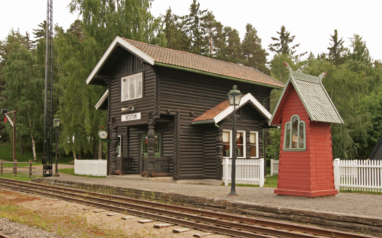 Bestum stasjon, Jernbanemuseet, Hamar. Bygd på 1890-tallet; ukjent arkitekt. Narvesenkiosk fra Tretten stasjon, bygd på 1890-tallet; arkitekt ukjent.